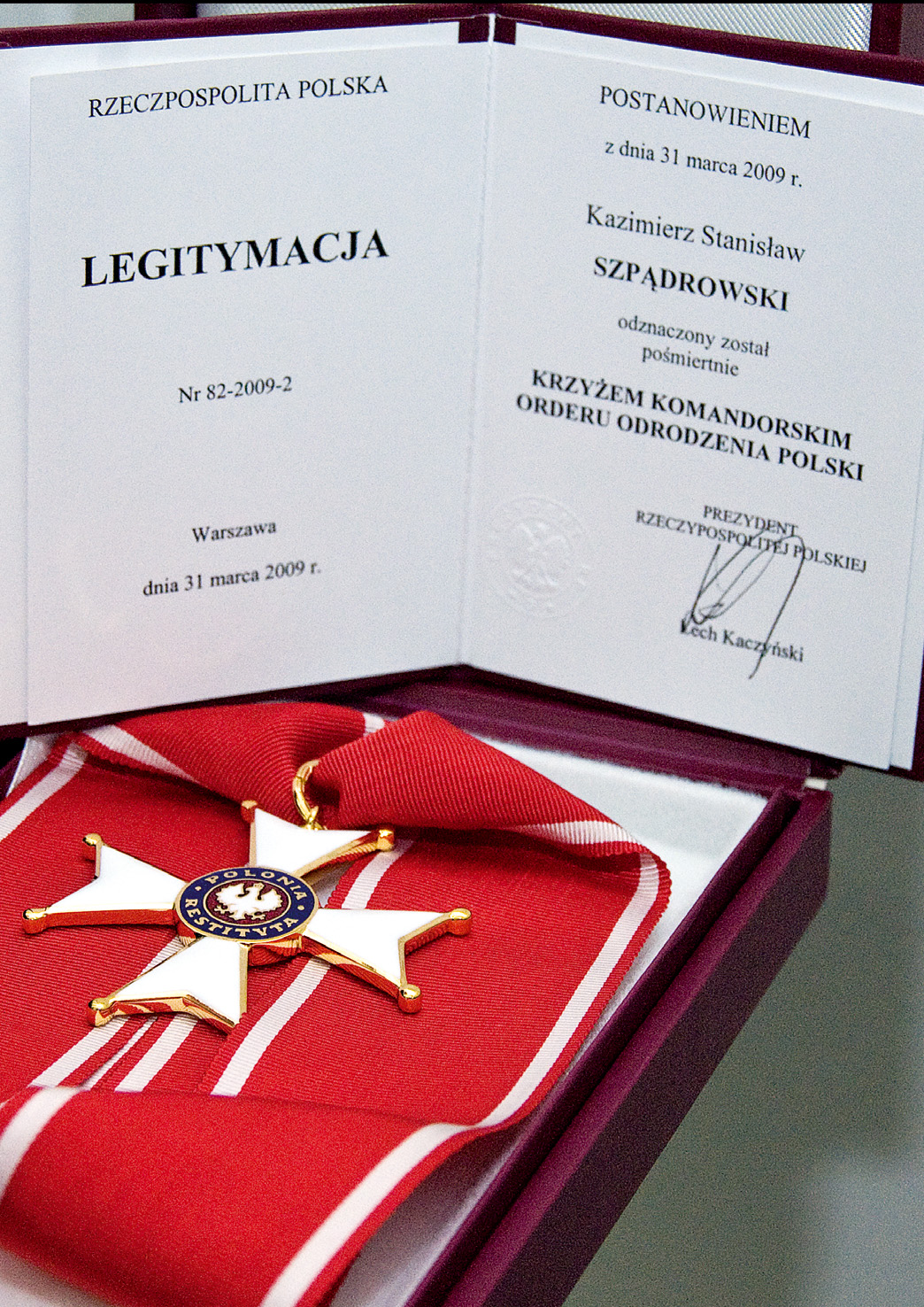 Krzyż Komandorski Orderu Odrodzenia Polski przyznany ppłk. Kazimierzowi Szpądrowskiemu 31 marca 2009r. przez Prezydenta RP Lecha Kaczyńskiego.